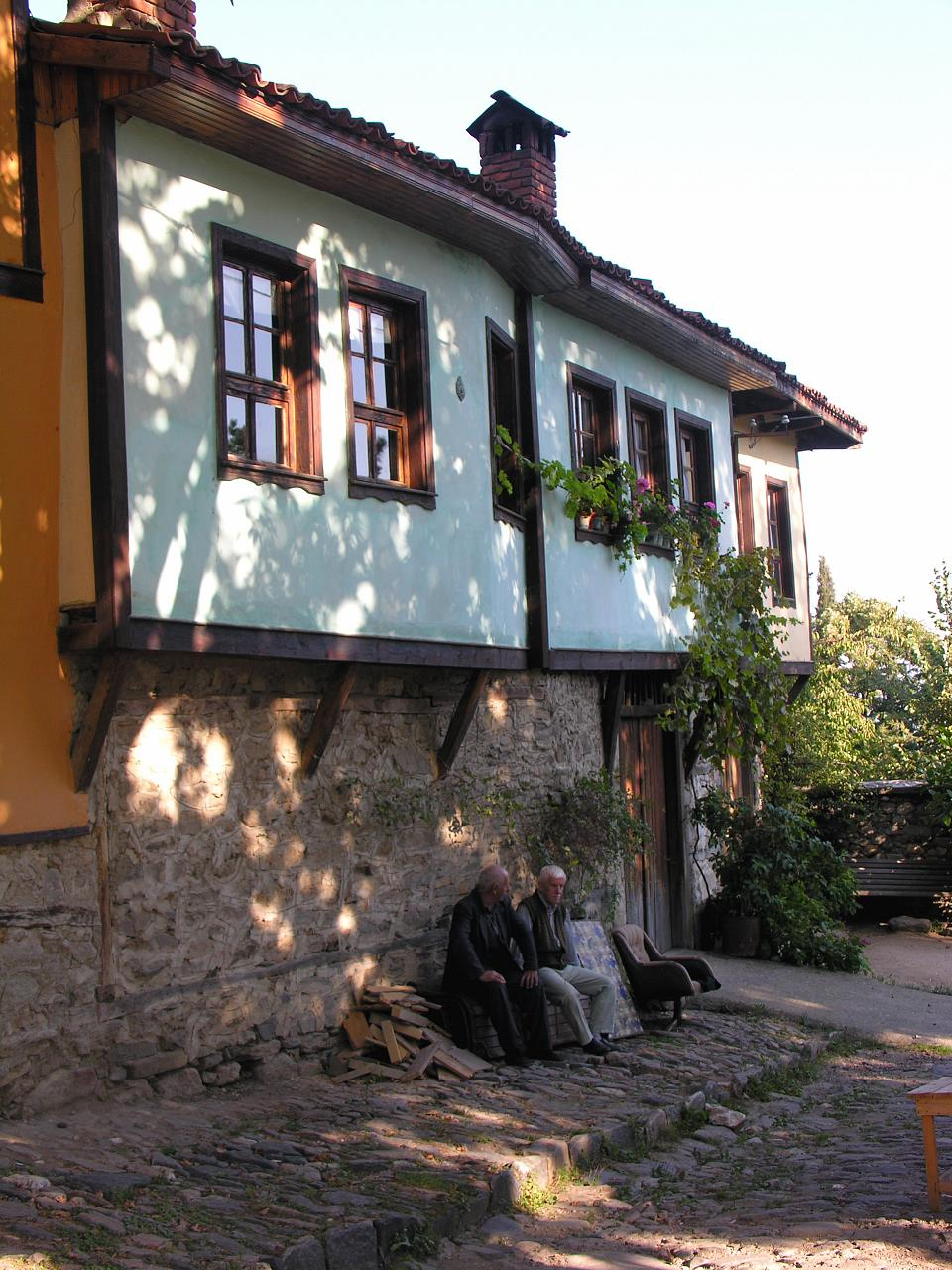 Cumalikizik Village, Turkey